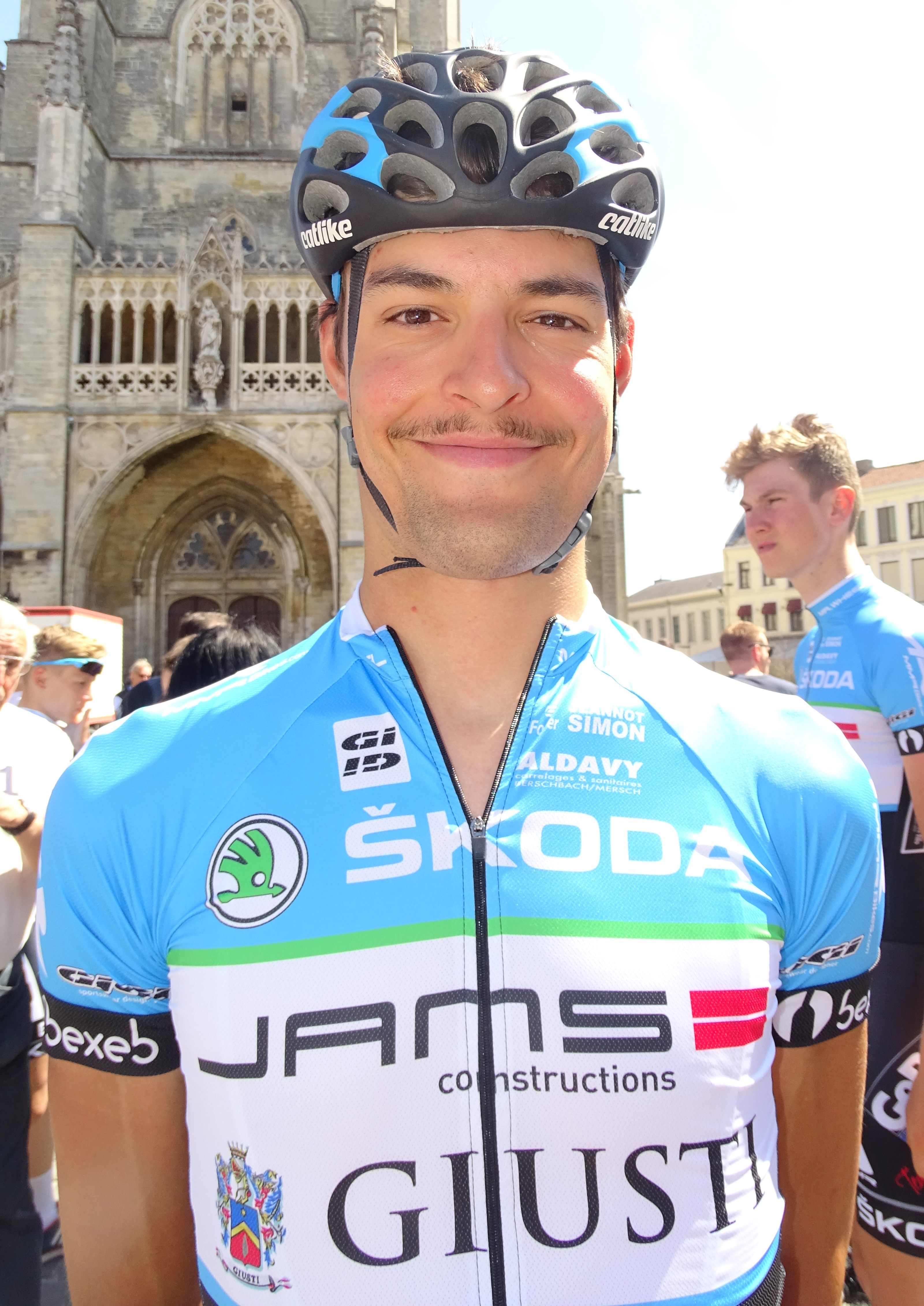 Reportage réalisé le dimanche 14 juin à l'occasion du départ et de l'arrivée du Tour du Limbourg 2015 à Tongres, Belgique.